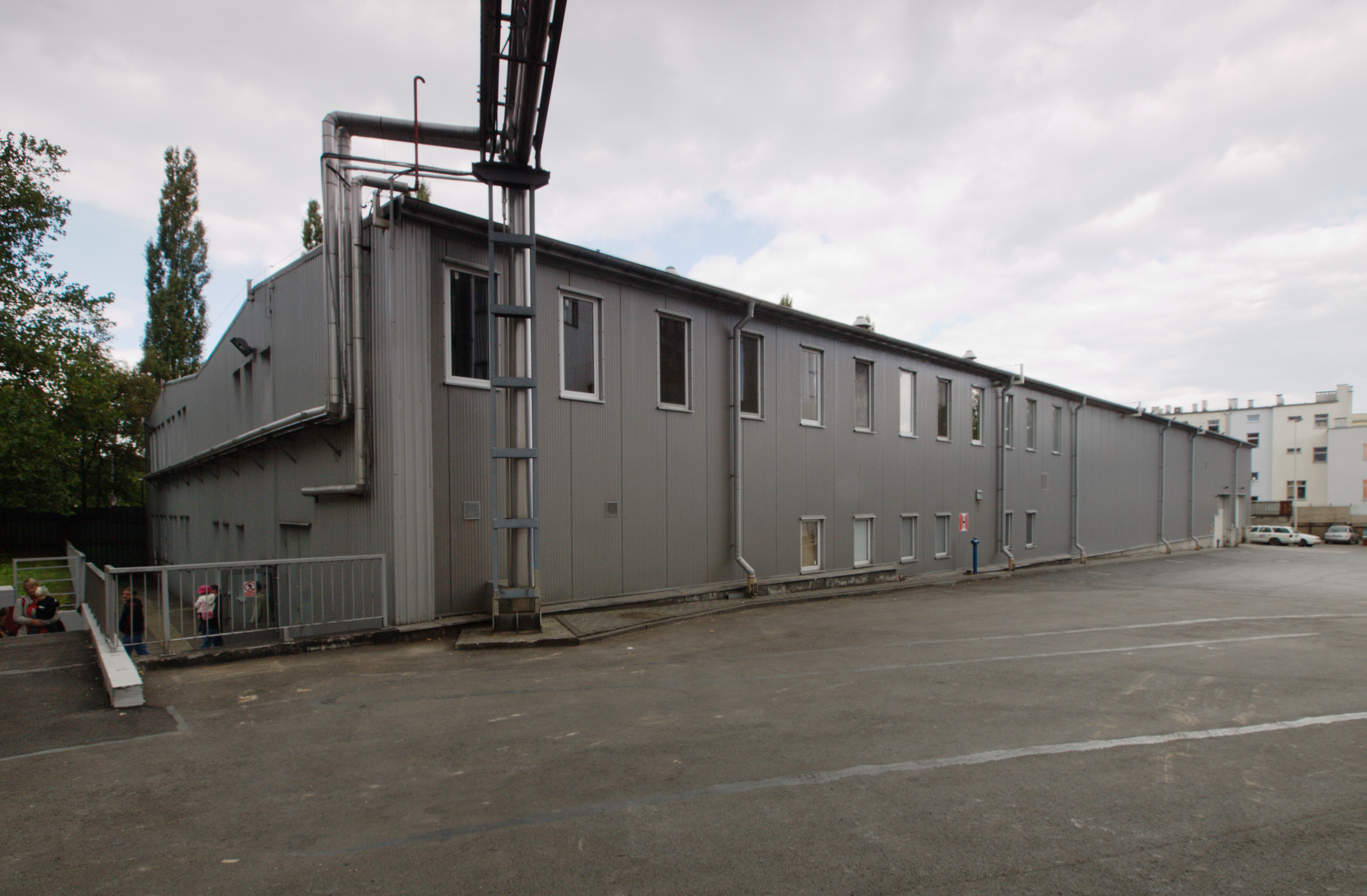 Browary Górnośląskie w Zabrzu. Rozlewnia piwa puszkowego.